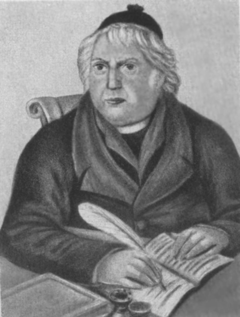 José Agostinho de Macedo, writer from Portugal.